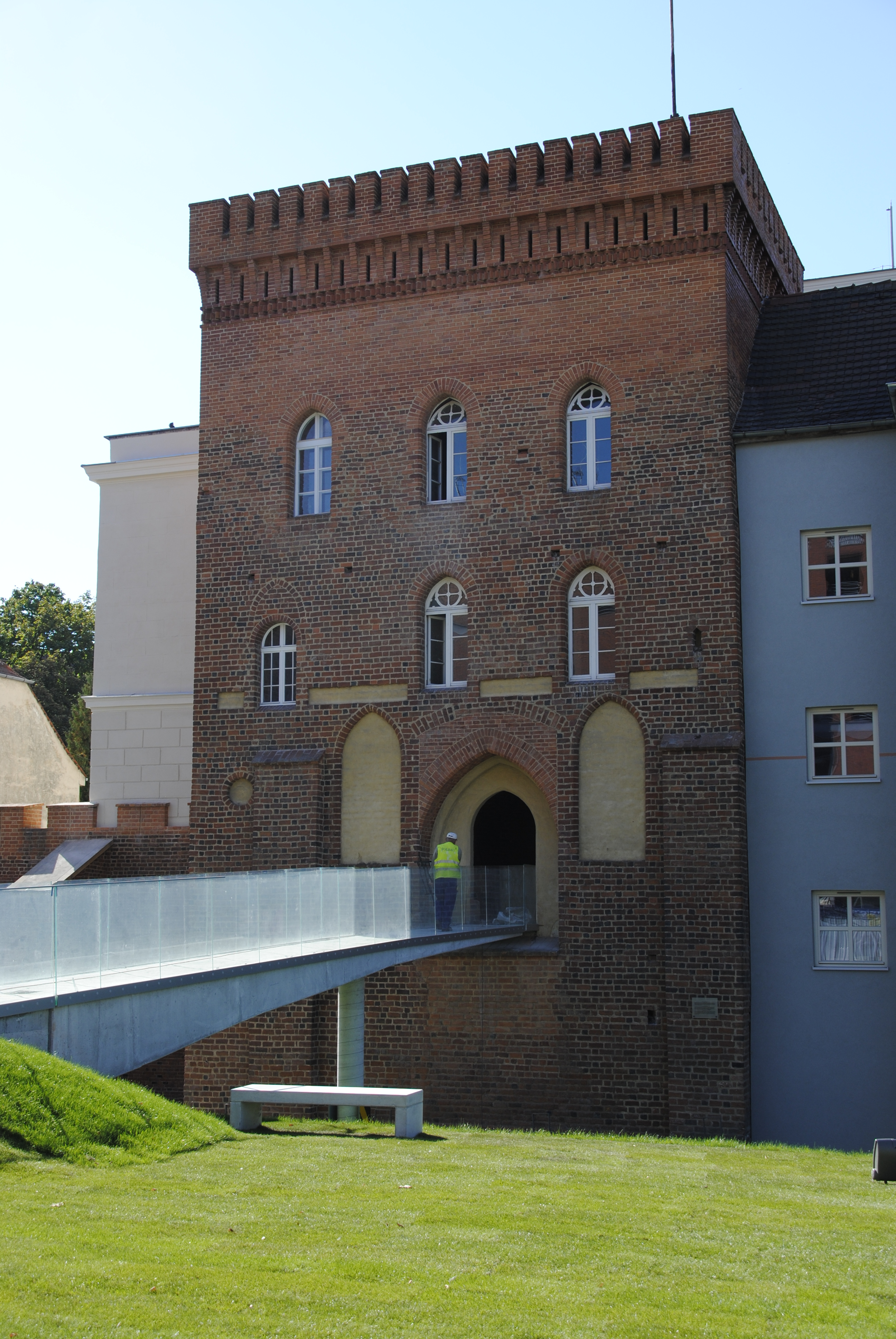 Turm des ehemaligen Oberen Schloss in Oppeln/Oberschlesien